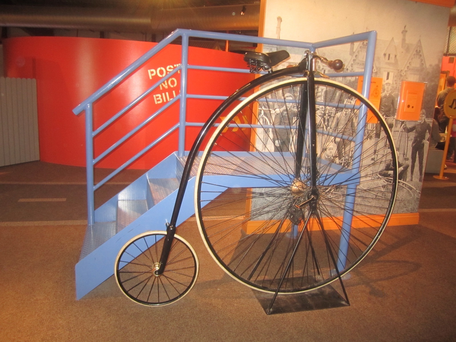 जुन्या प्रकारची सायकल एक चाक छोटे आणि एक मोठे आहे.